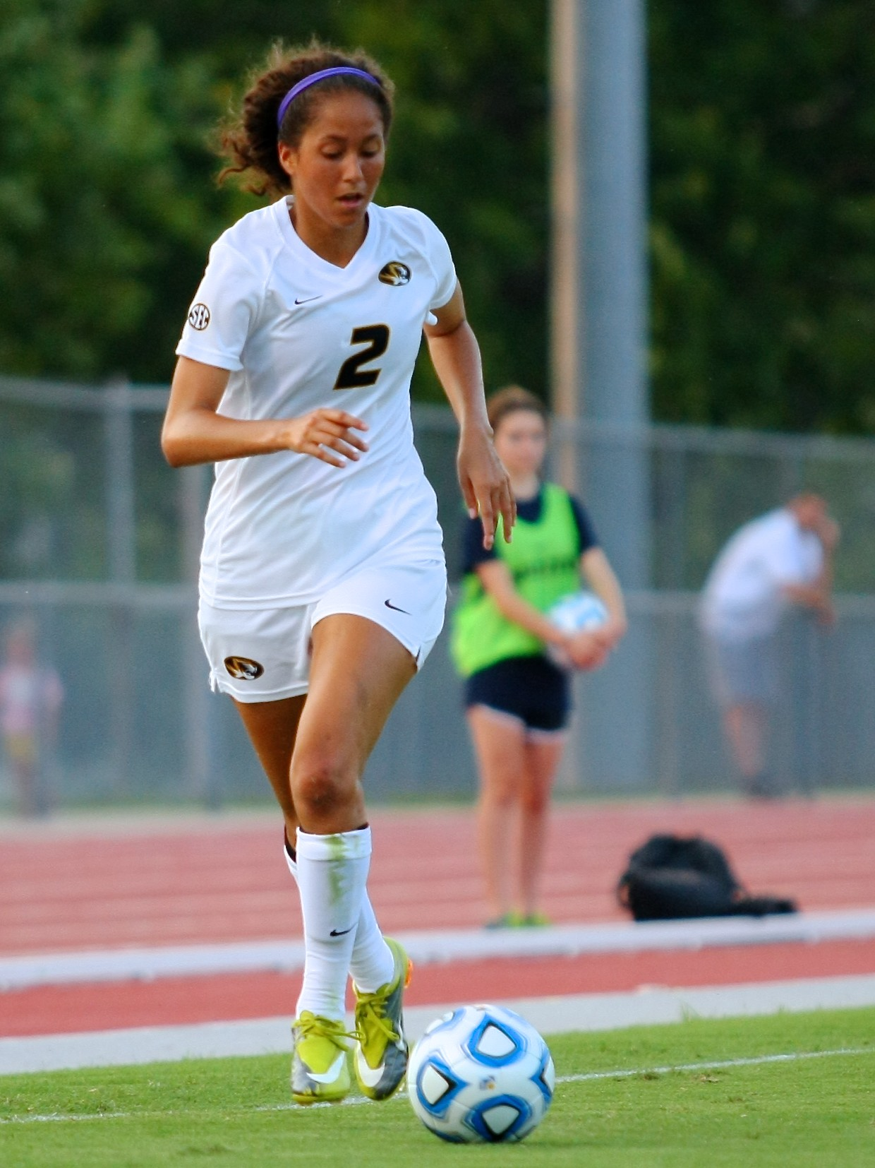 Dominique Richardson